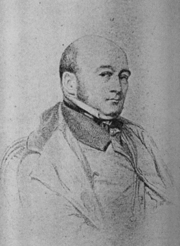 French singer and song-writer Frédéric Bérat (1801-1855)